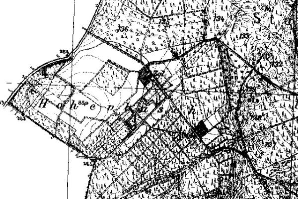 Neuaufnahme 1891-1912